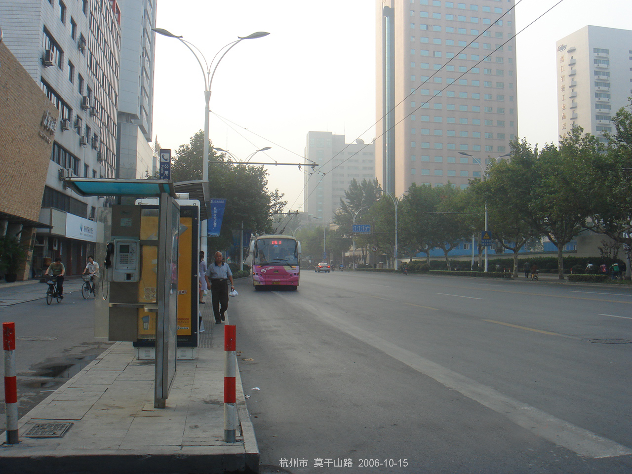 2006年杭州莫干山路